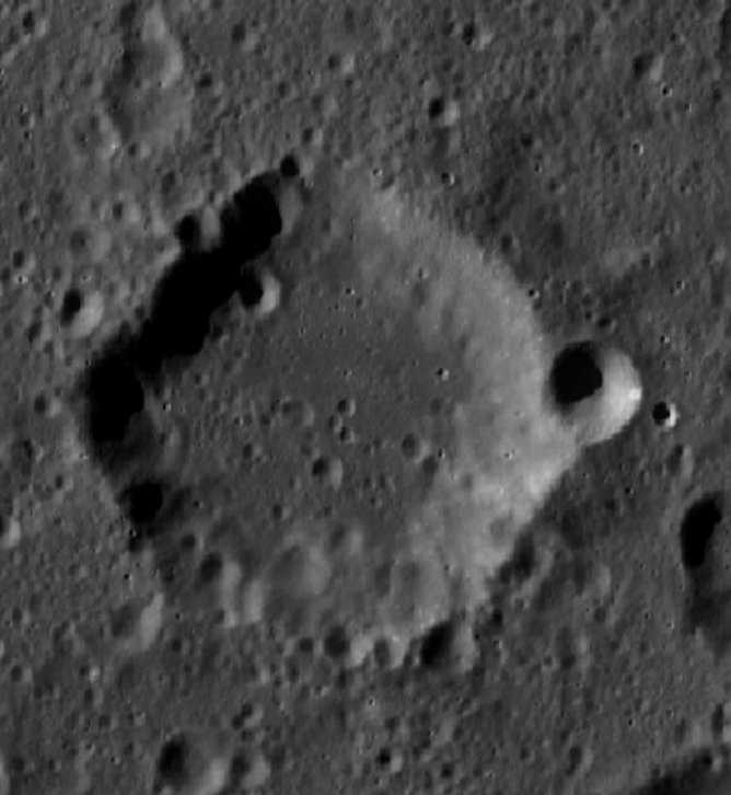 Cráter lunar Spallanzani. (Imagen LRO)